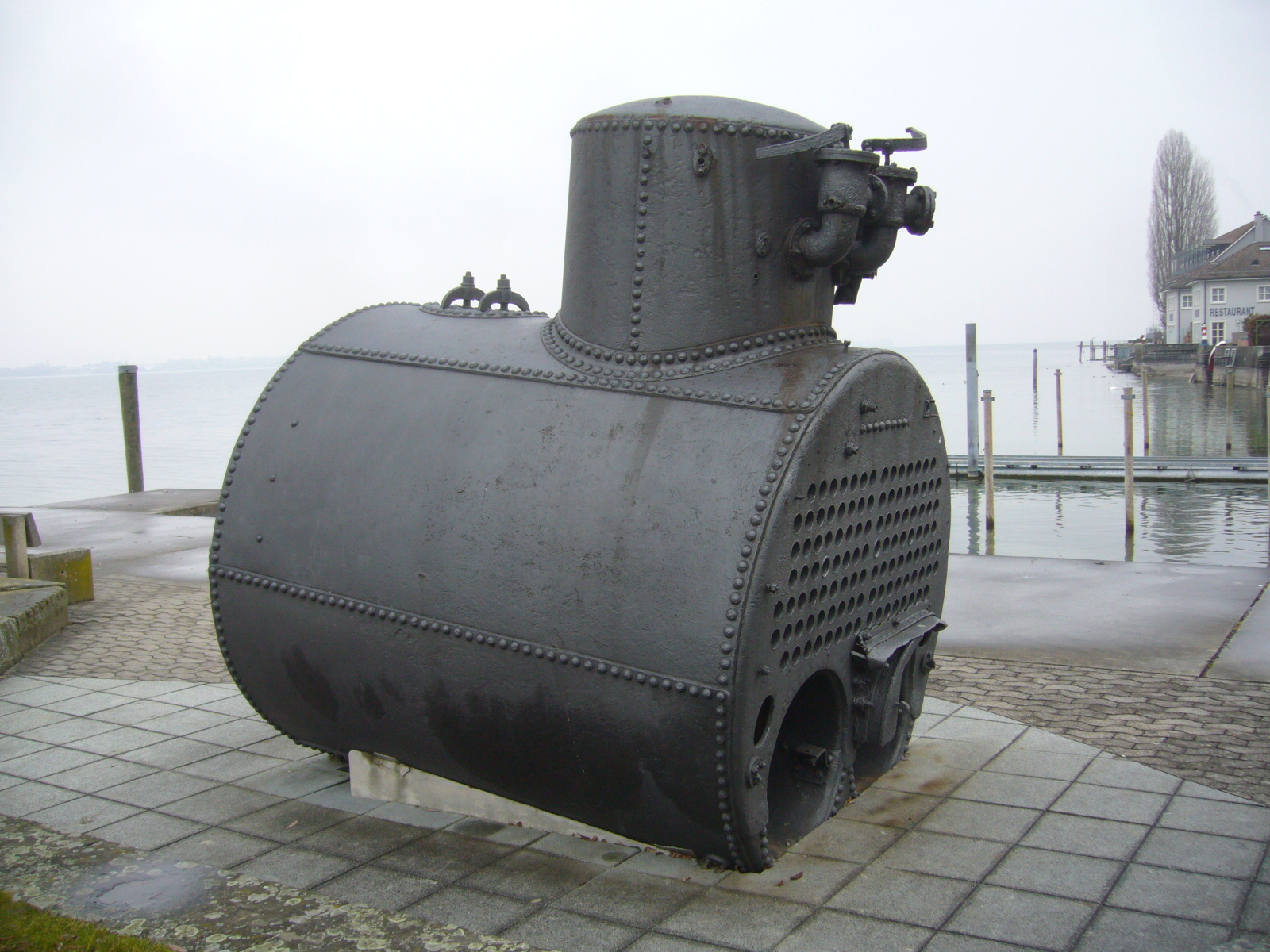 Dampfkessel der Neptun des Raddampfers Rheinfall, der 1869 bei Berlingen unterging, ausgestellt beim Schiffsteg Berlingen. Geborgen wurde er 1995